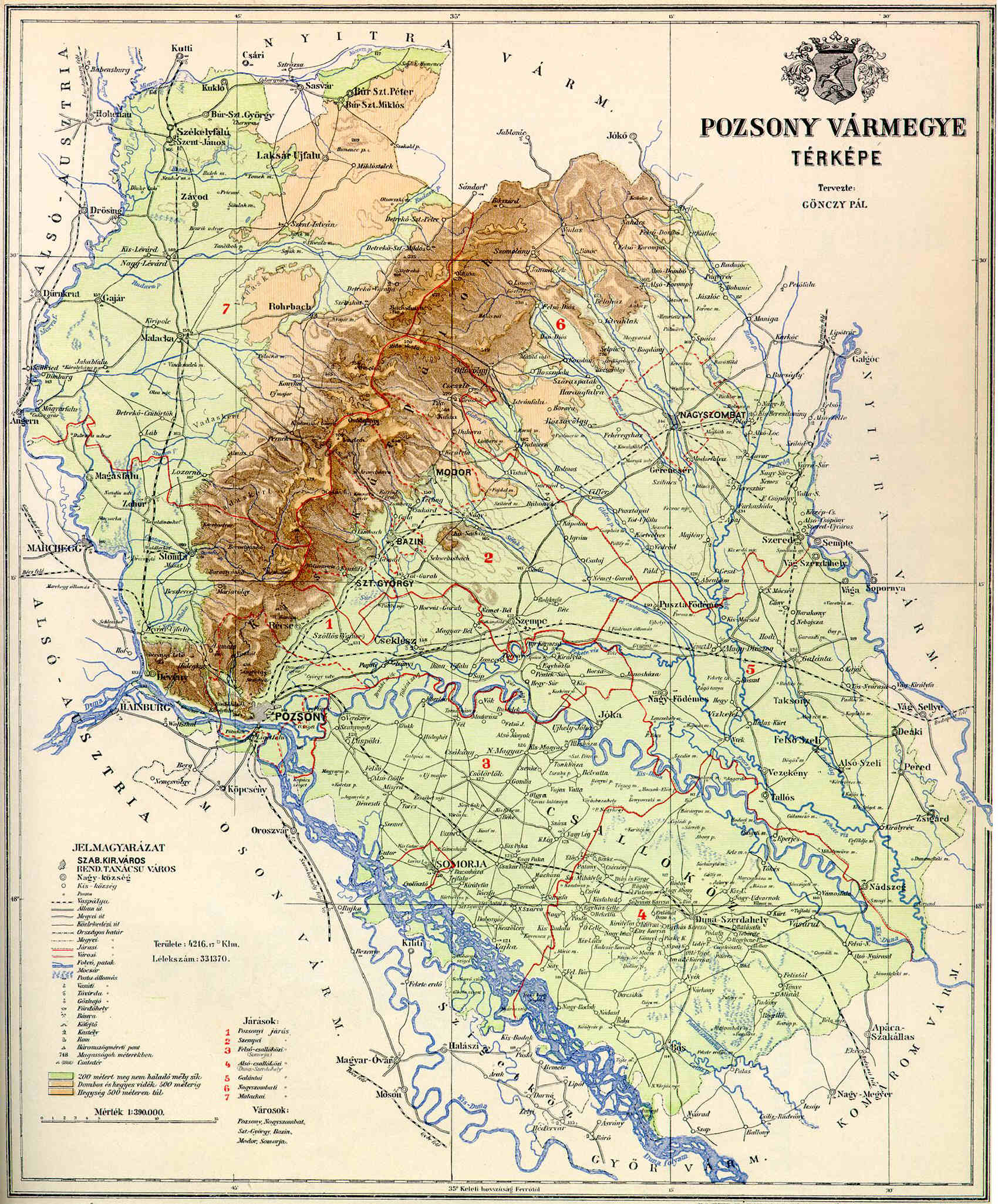 County of pozsony in the pre-Trianon Kingdom of Hungary. Komitat Pozsony w Królestwie Węgier przed traktatem w Trianon.